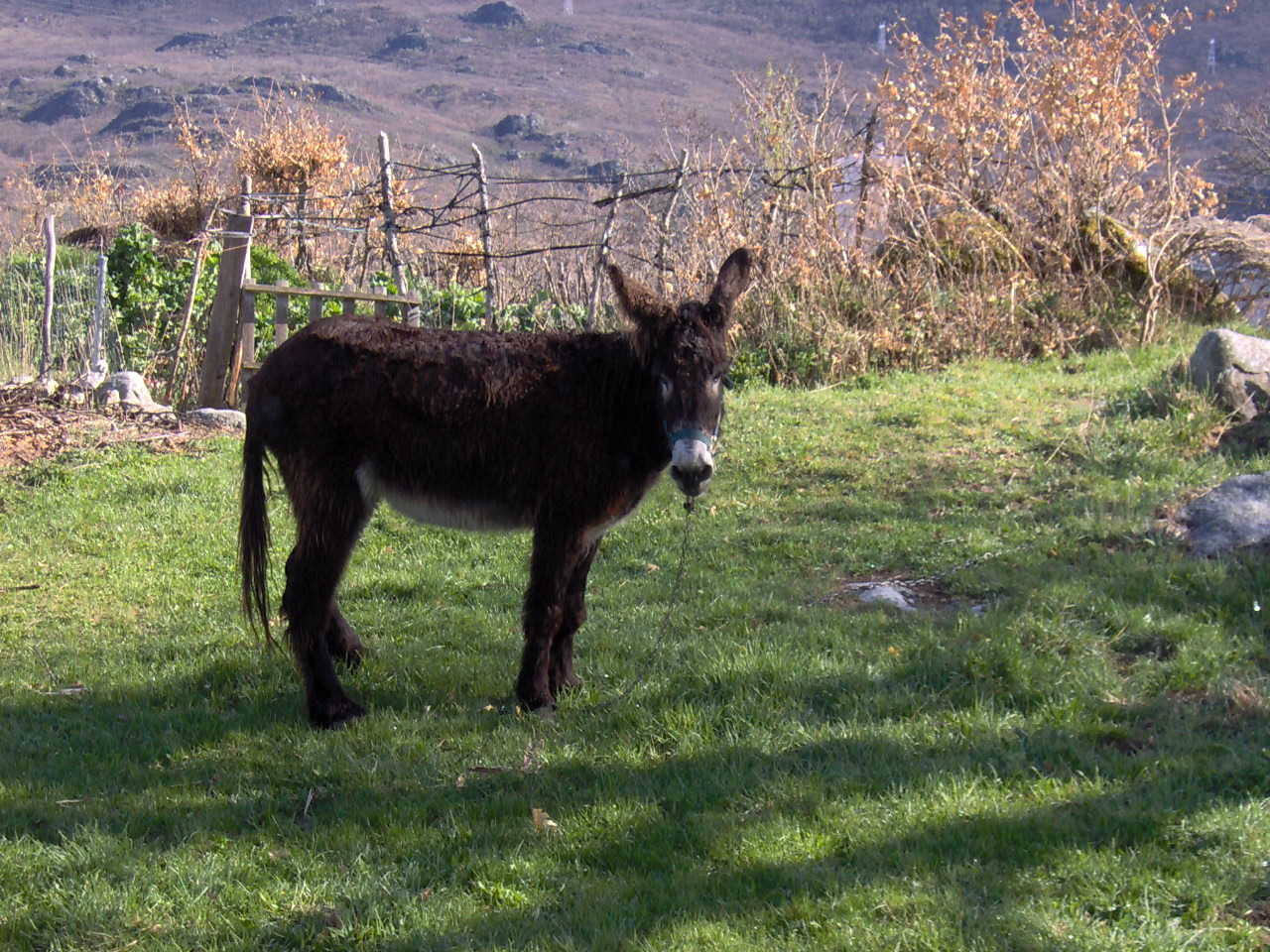 Burro zamorano